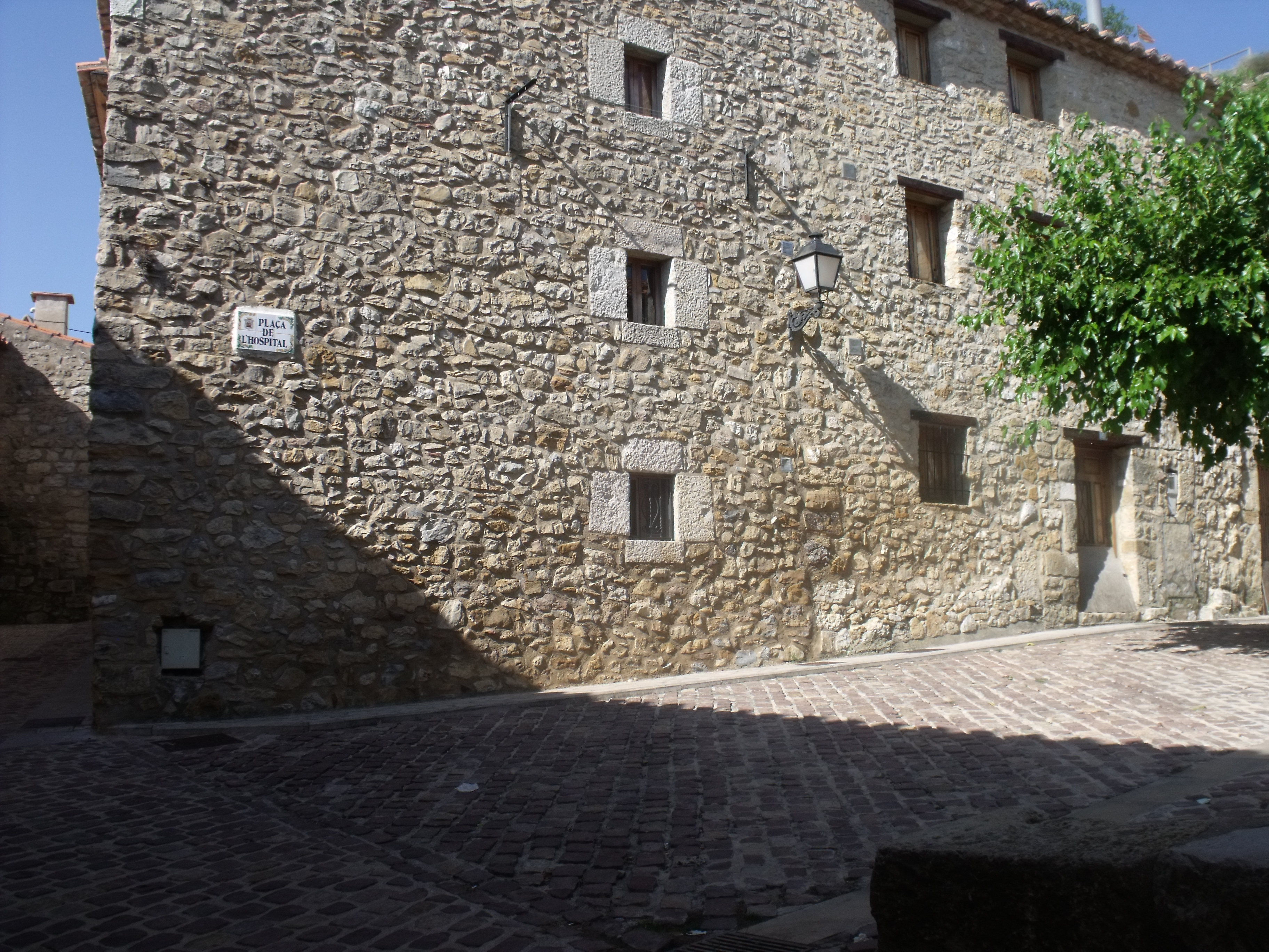 Plaza del Hospital.